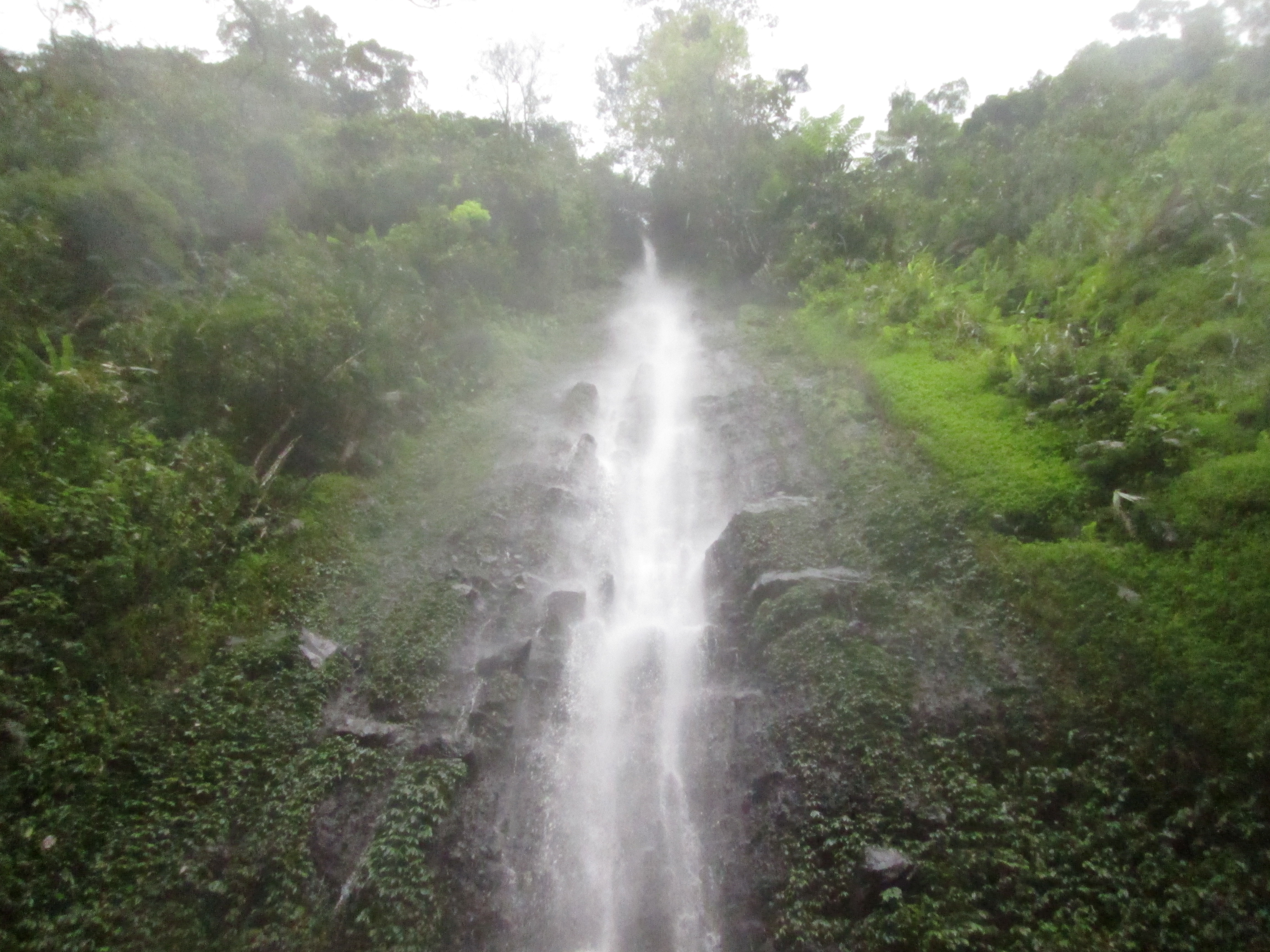 Curug Beret, Curug yang ada di Kawasan Taman Nasional Gunung Gede Pangrango di desa Sukagalih, Megamendung.